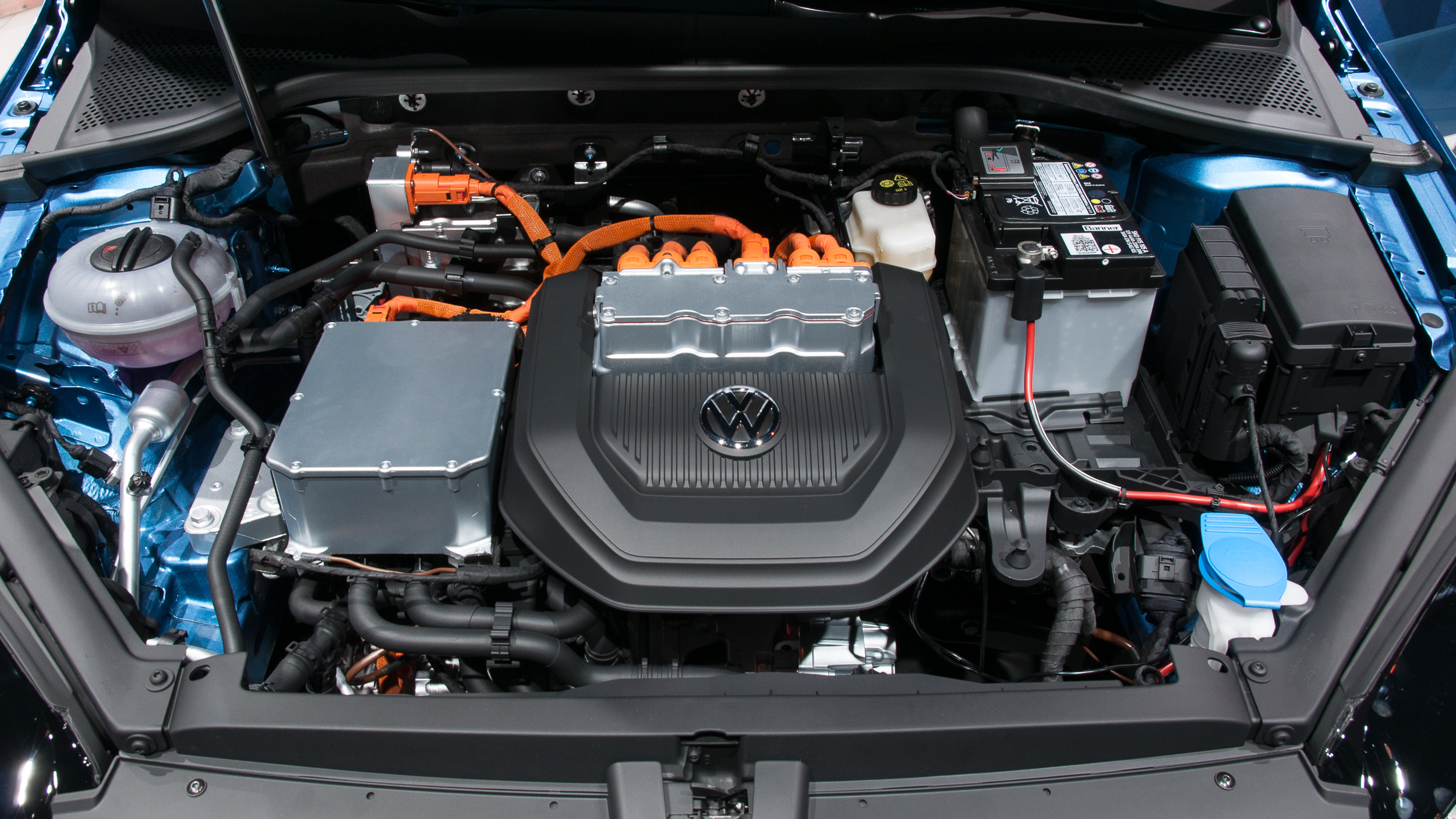 Motorraum Volkswagen e-Golf